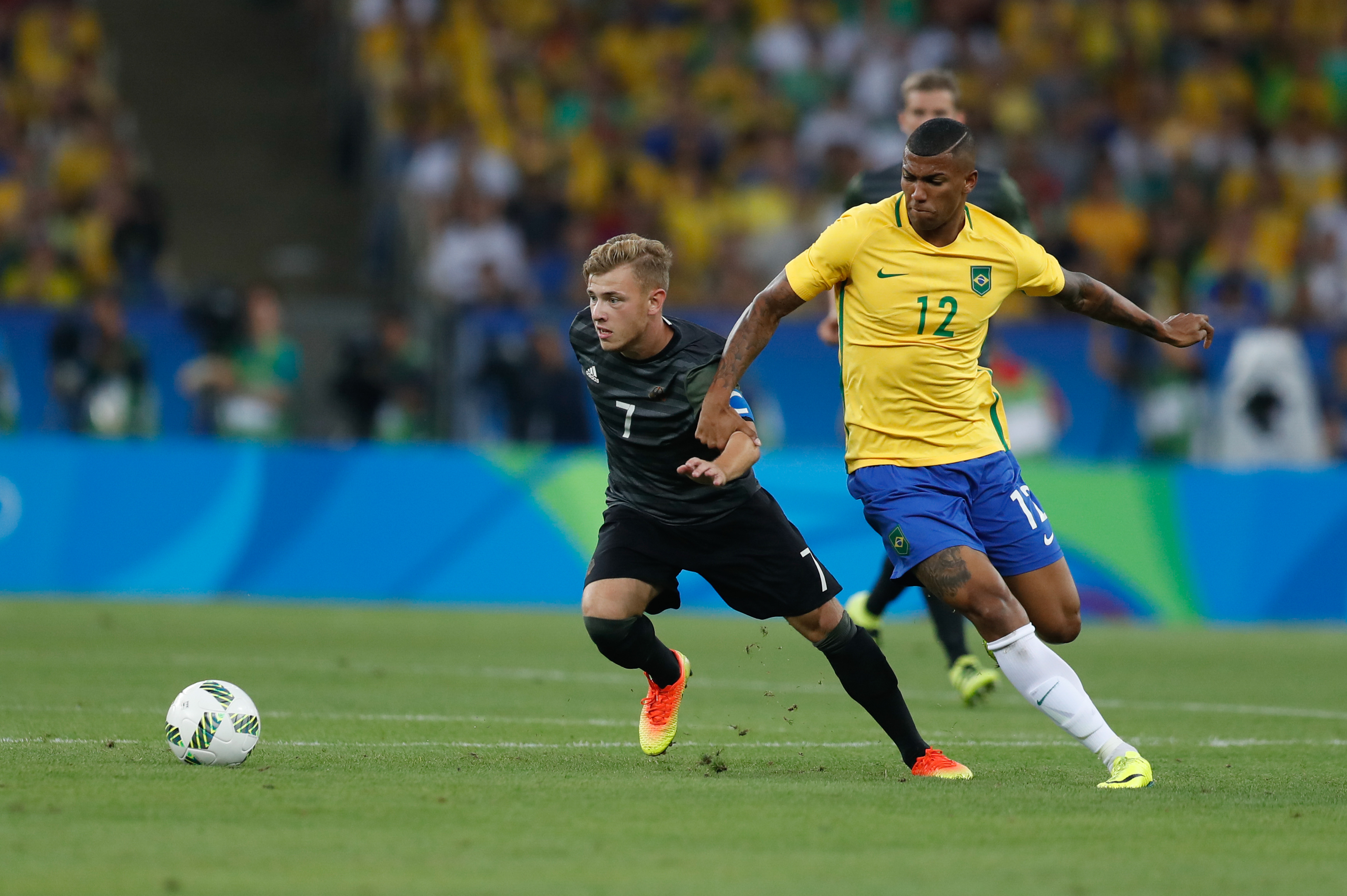 Rio de Janeiro - Brasil e Alemanha disputam a medalha de ouro no futebol masculino